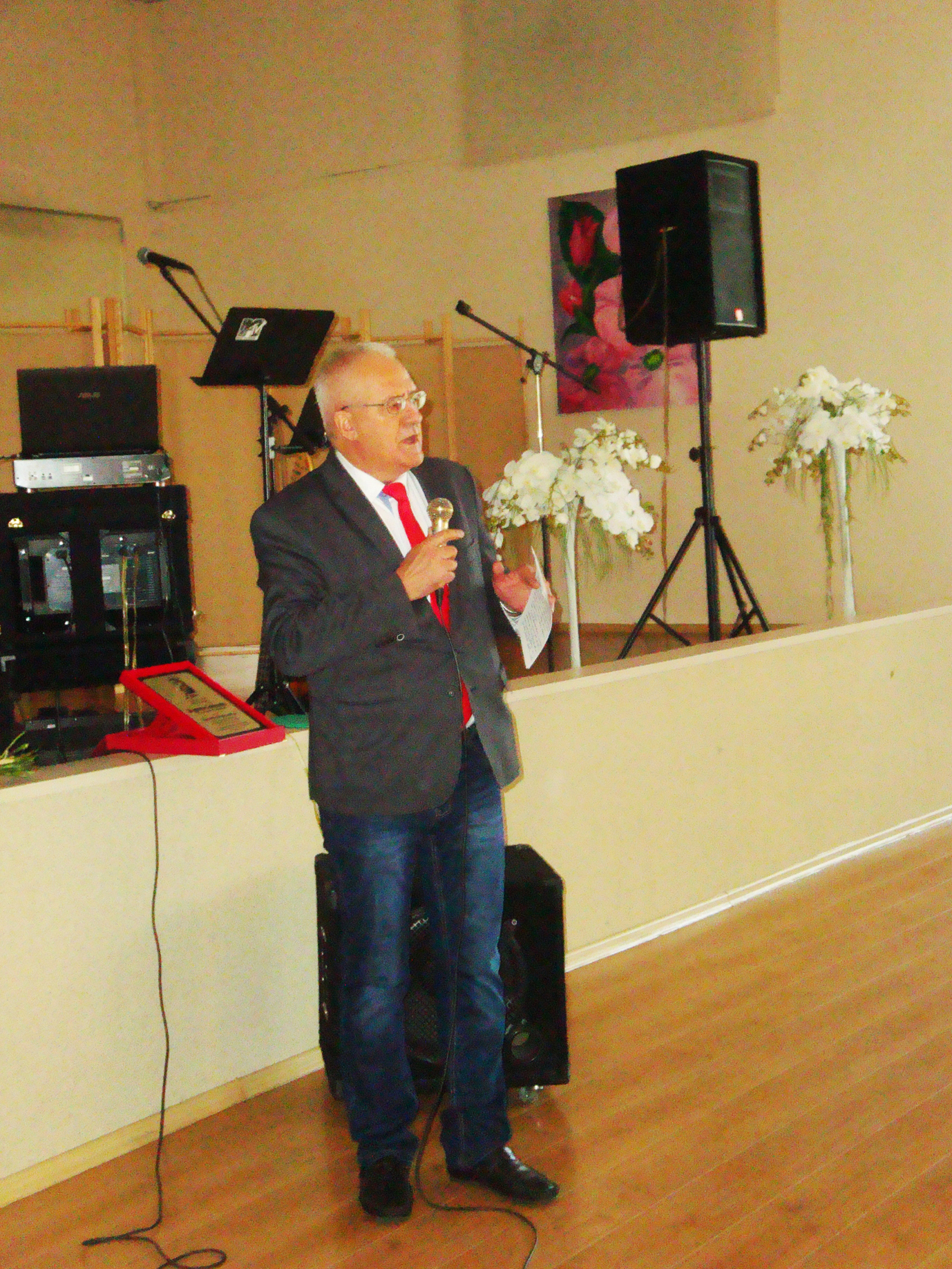 Ryszard Poradowski laureatem Nagrody Literackiej im Jerzego Wilmańskiego wręczonej w Łodzi 13 10 2018 (3)